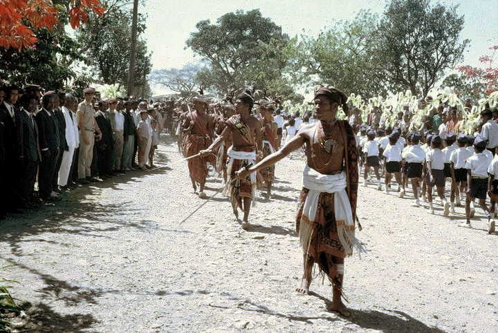 Desfile de uma Companhia de Moradores armados de espadas gentílicas.Á direita vê-se também alunos de uma escola a desfilar.